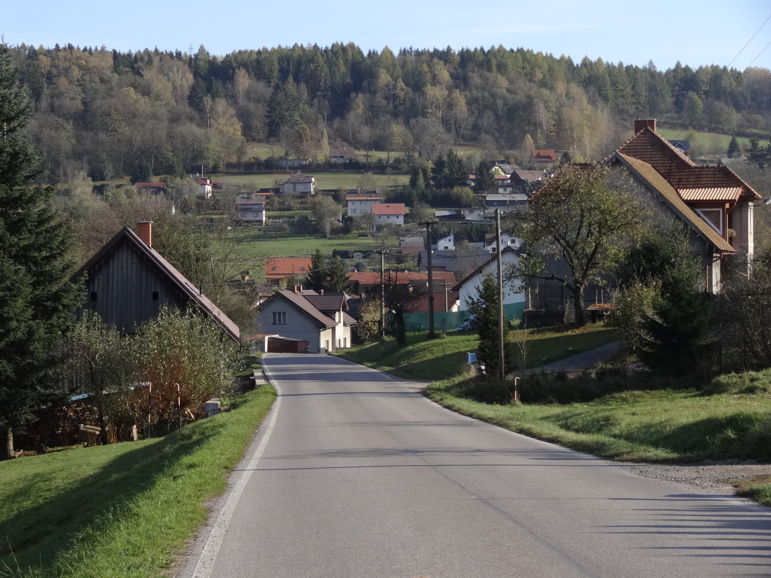 Chuchelna - okolí domů čp. 40 a 242 od západu